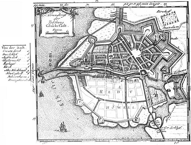 Glückstadt Erweiterungsplan aus dem Jahr 1643, der begonnen, aber nicht ausgeführt wurde. Er ist veröffentlicht in "Newe Landesbeschreibung der zwey Hertzogthümer Schleswich und Holstein" Husum 1652. Er wurde danach immer wieder bis ins 18. Jahrhundert nachgedruckt. (Hierzu: Gerhard Köhn: Glückstadt. In: Das Bild der Stadt in der Neuzeit 1400 - 1800. München 1999. S. 219 - 226 und